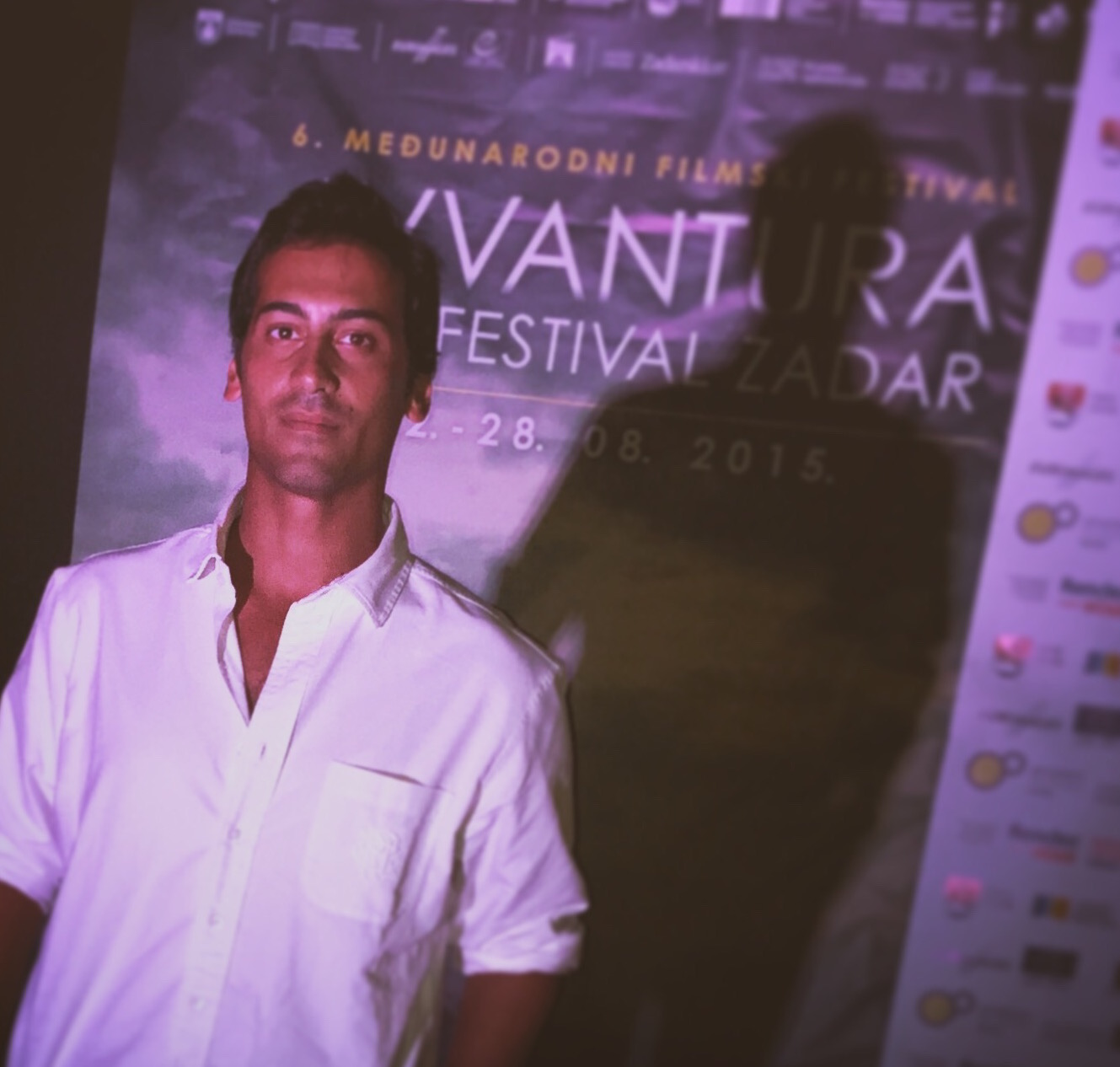 Goldnadel à Zadar